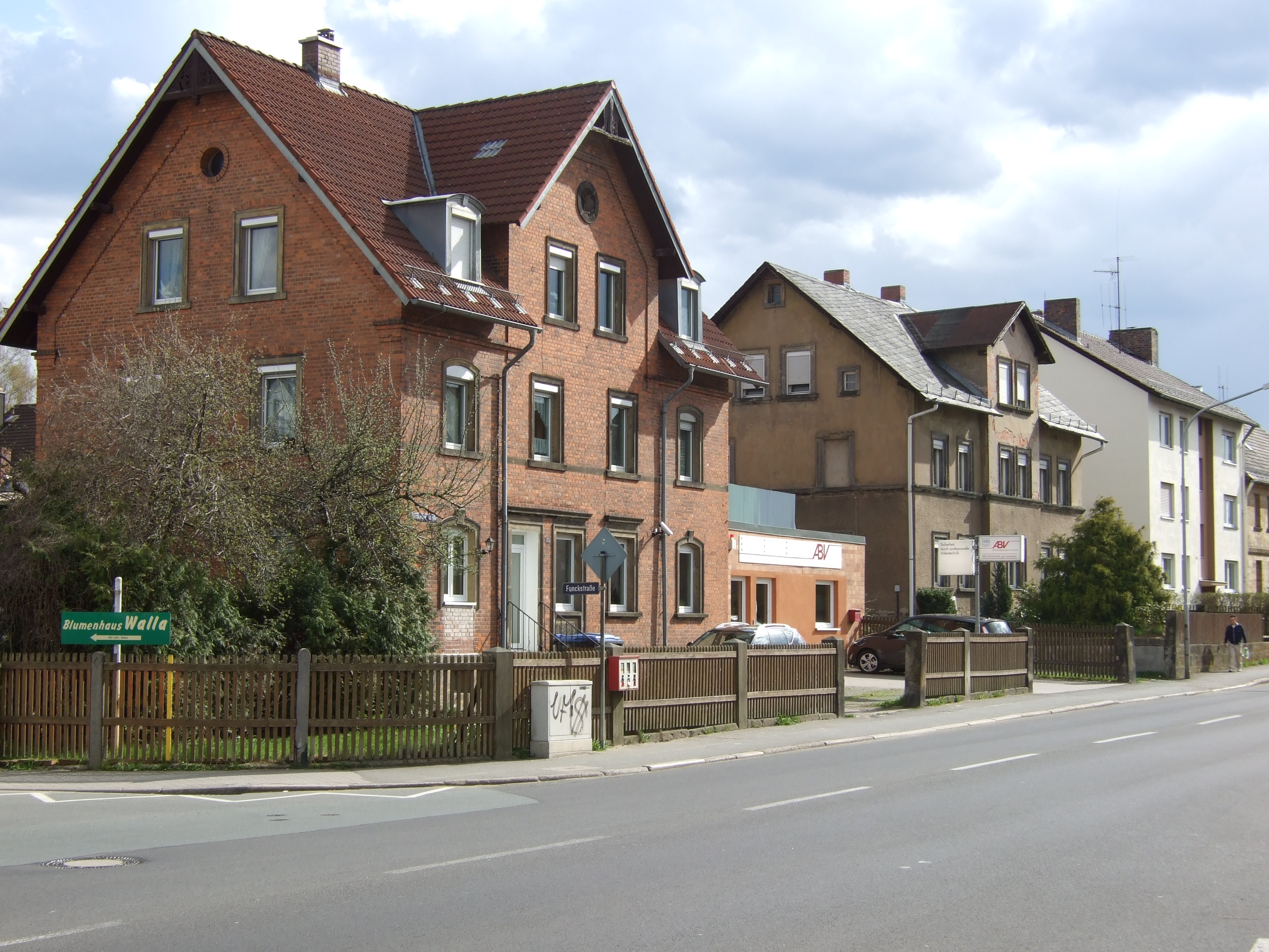 Bayreuth Bamberger Straße